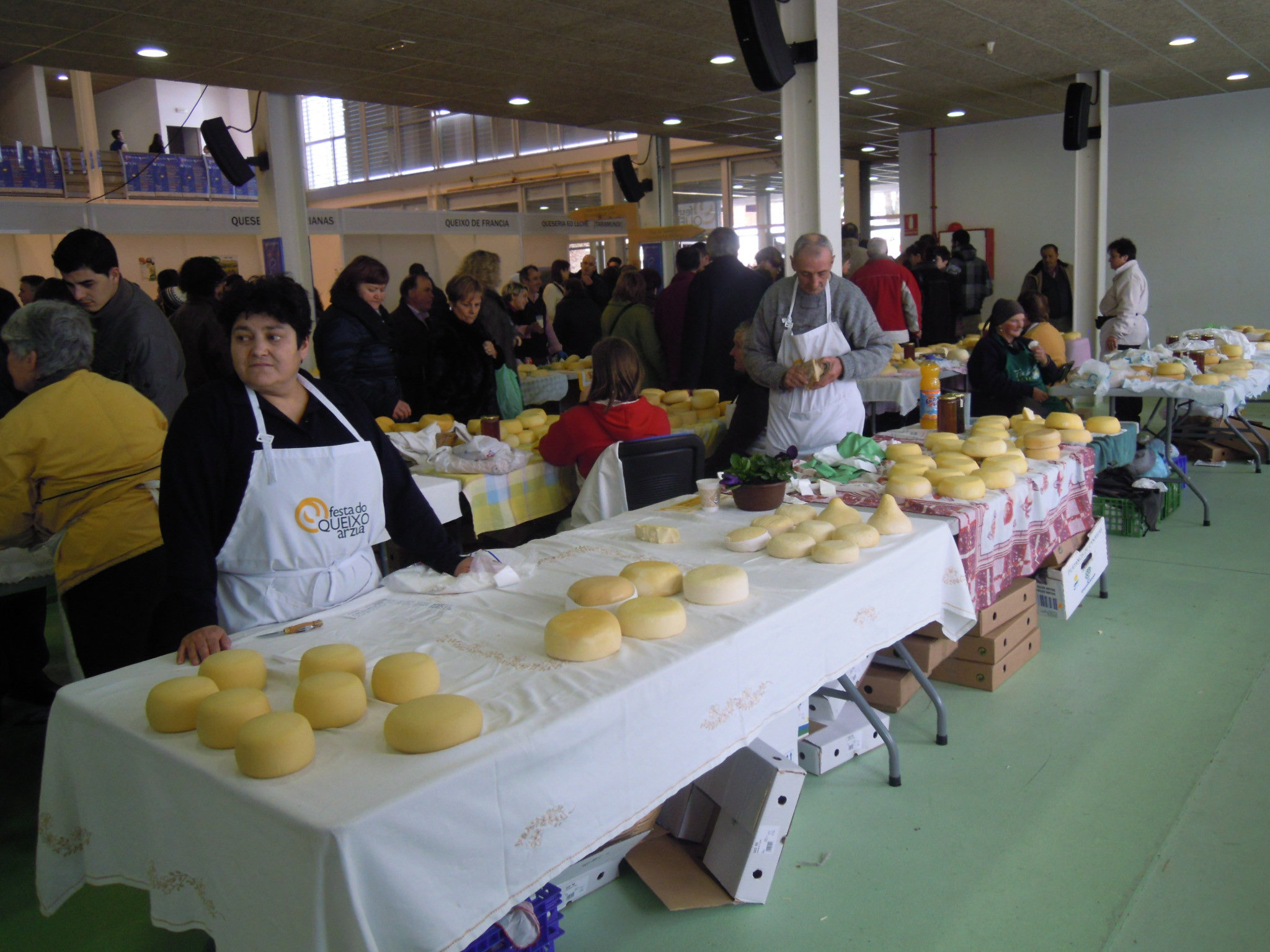 Festa do queixo de Arzúa, en Arzúa.